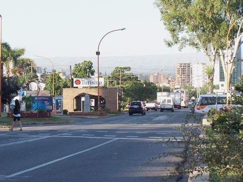 Foto vista del frente de la secretaria de turismo de Villa Carlos Paz